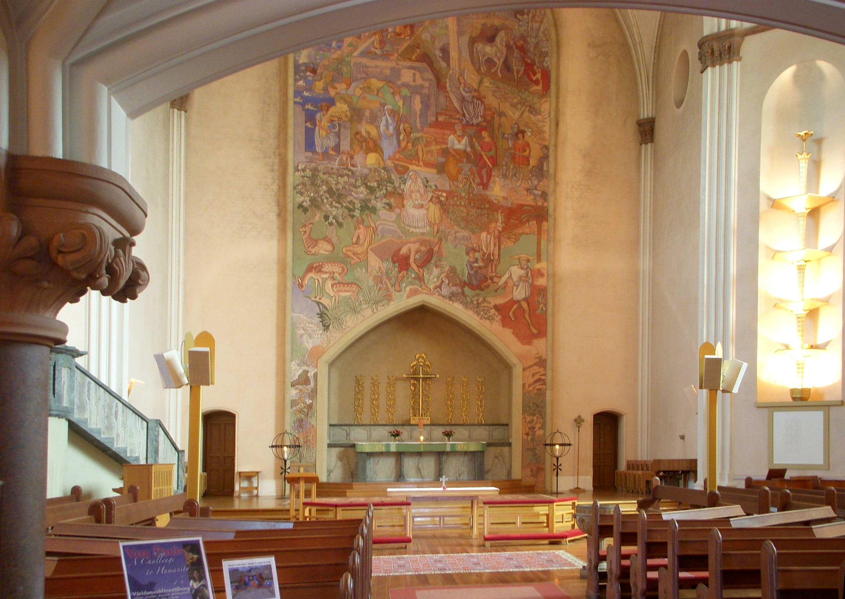 Sofia kyrka på Södermalm i Stockholm, interiör